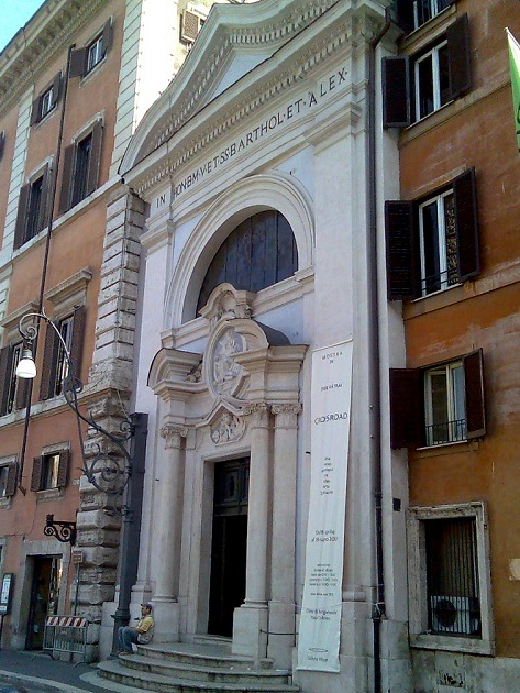 Una chiesa del centro storico di Roma, Italy